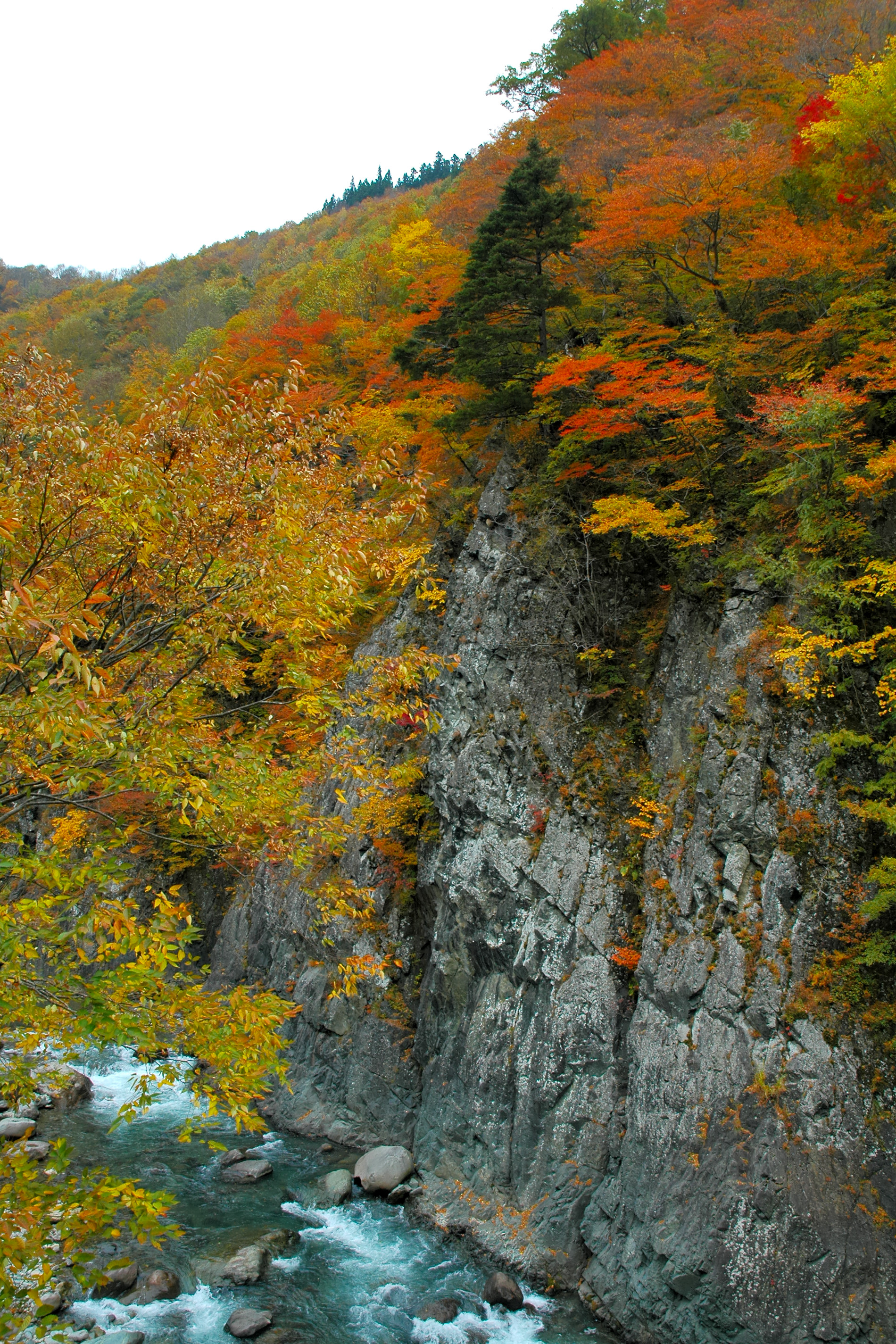 Akiyamago (秋山郷, one of 日本の秘境100選)